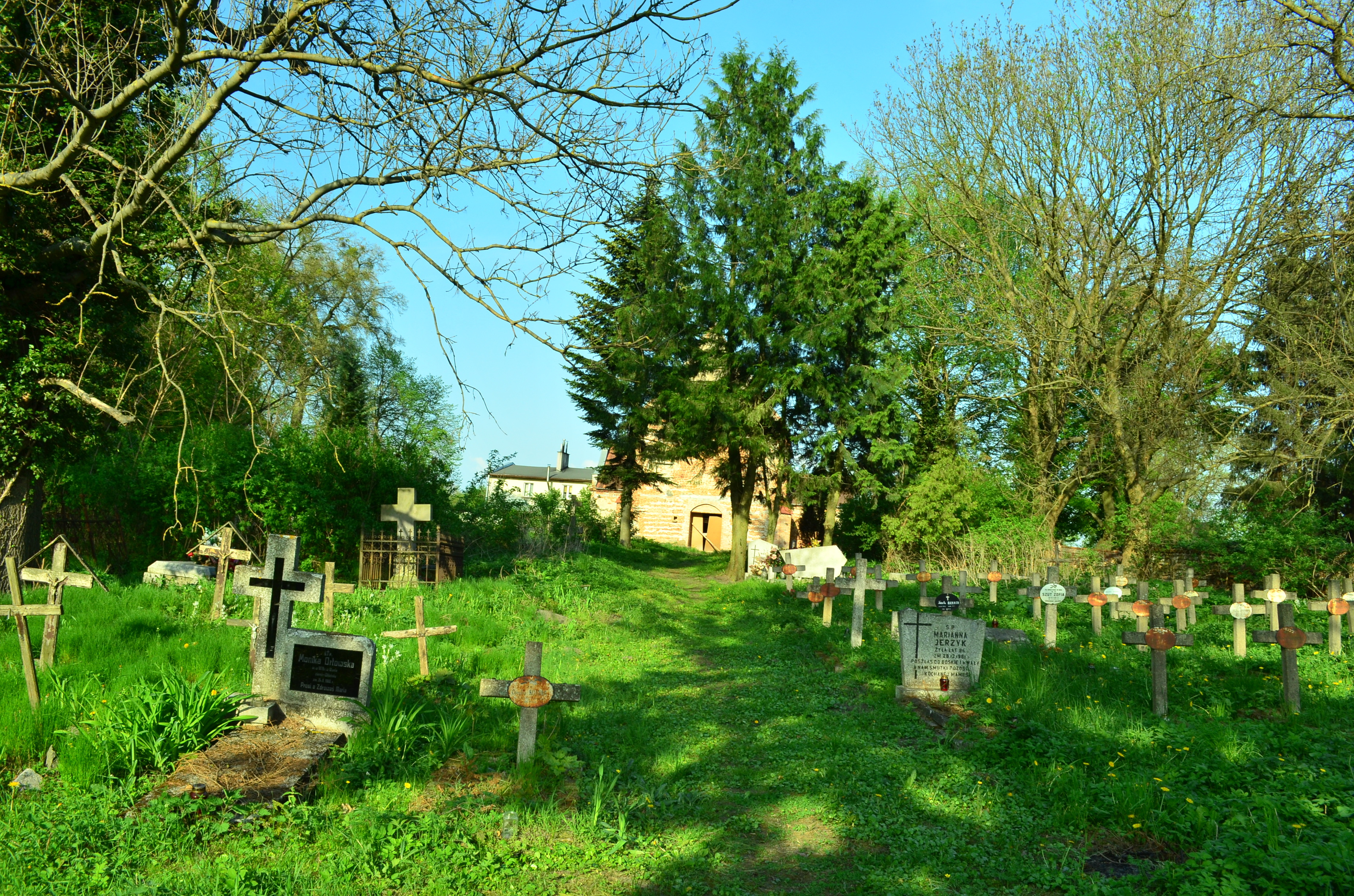 Owińska, kościół par., ob. cmentarny p.w. św. Mikołaja, poł. XVI